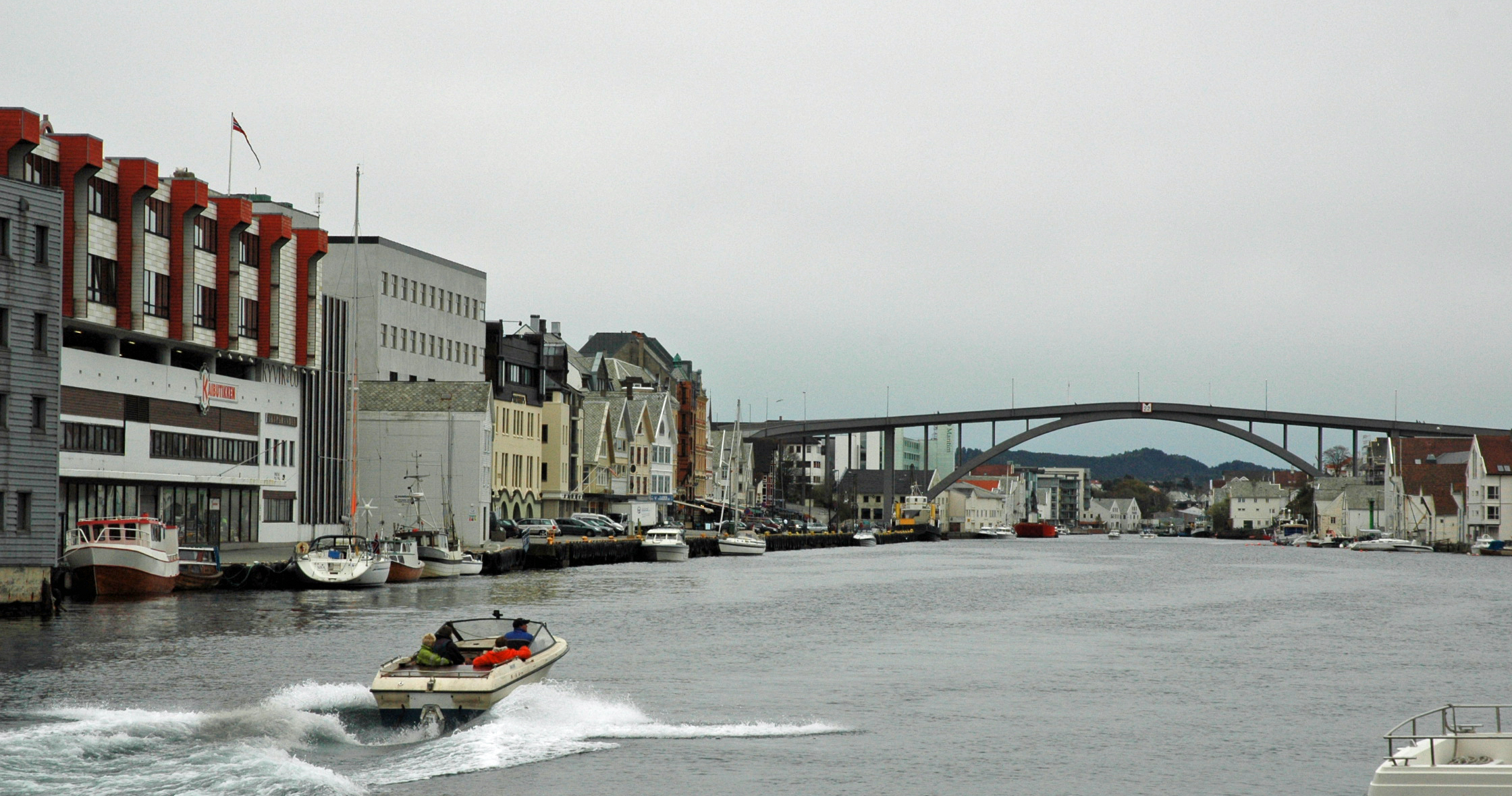 Smedasundet